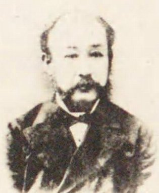 時任為基（1842-1905）